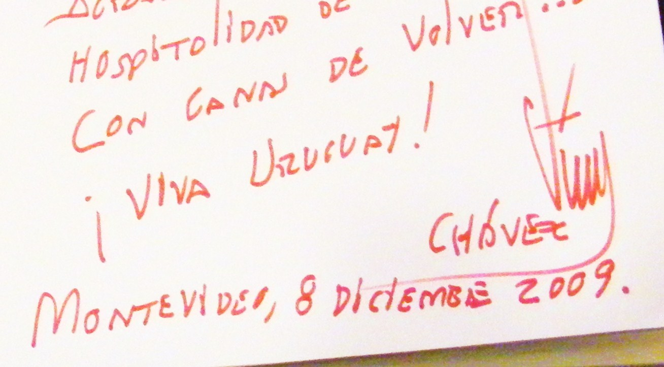 Unterschrift des Hugo Chavez im Gästebuch des Belmont Hotel in Montevideo / Uruguay (vom 8. Dezember 2009)